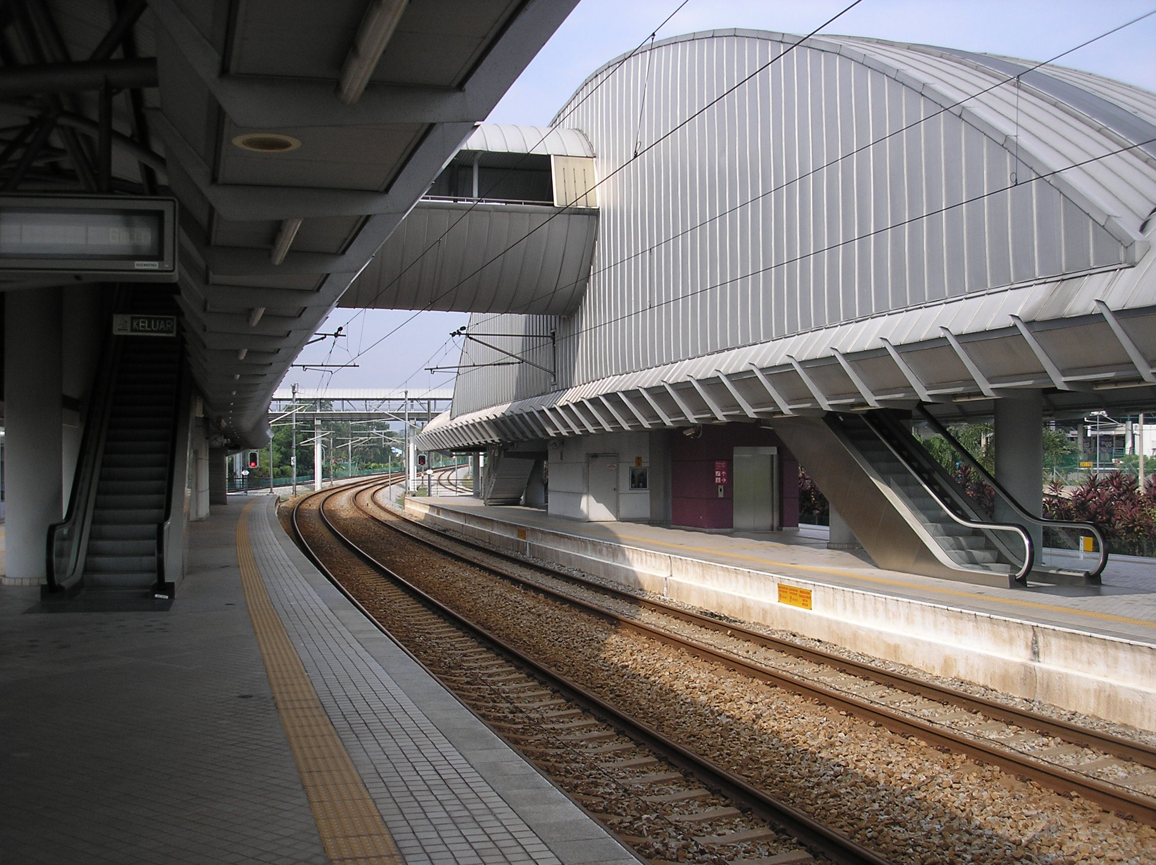 Platforms of the Bandar Tasik Selatan station (ERL), Bandar Tasik Selatan, Kuala Lumpur, Malaysia.